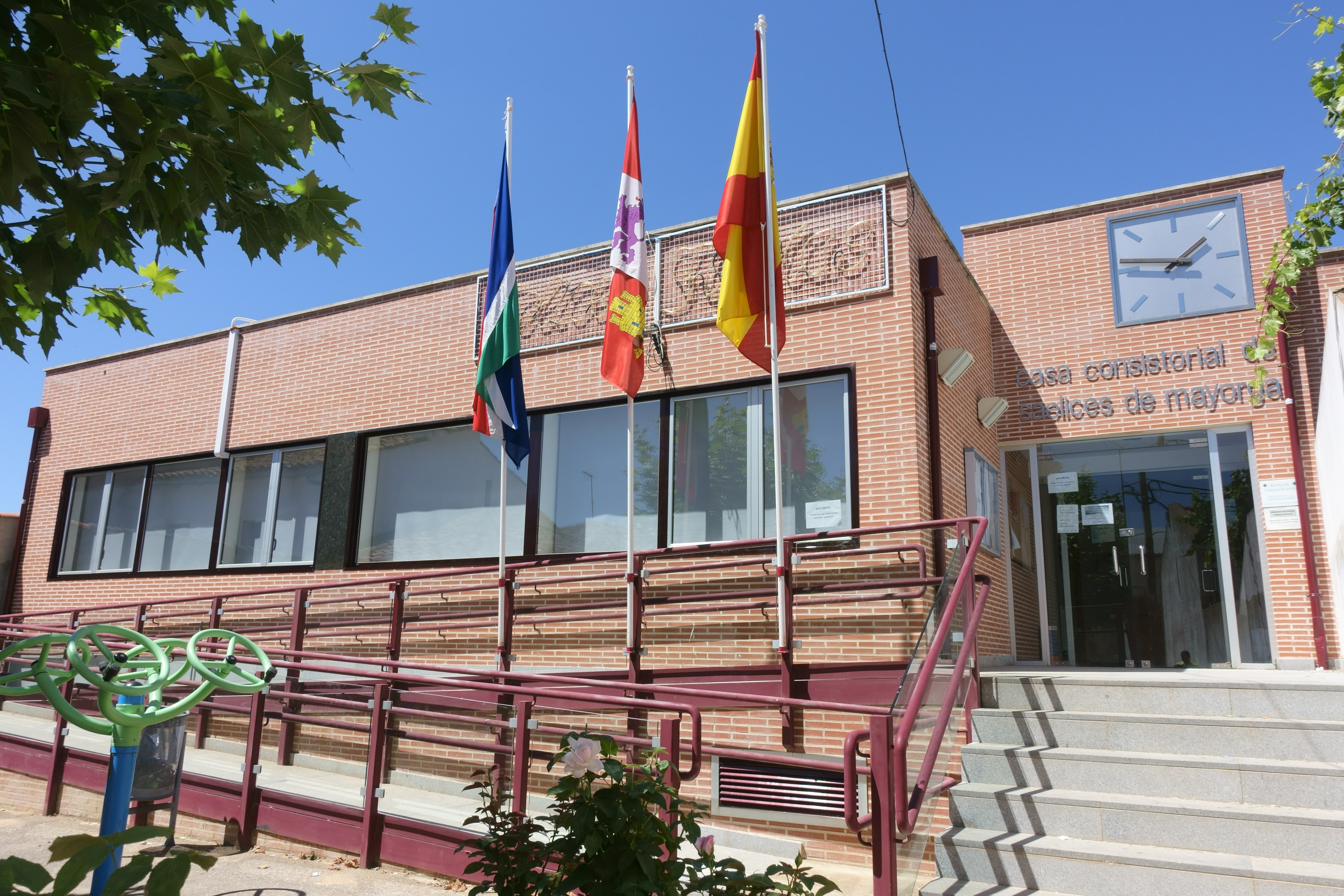 Casa consistorial de Saelices de Mayorga (Valladolid, España).